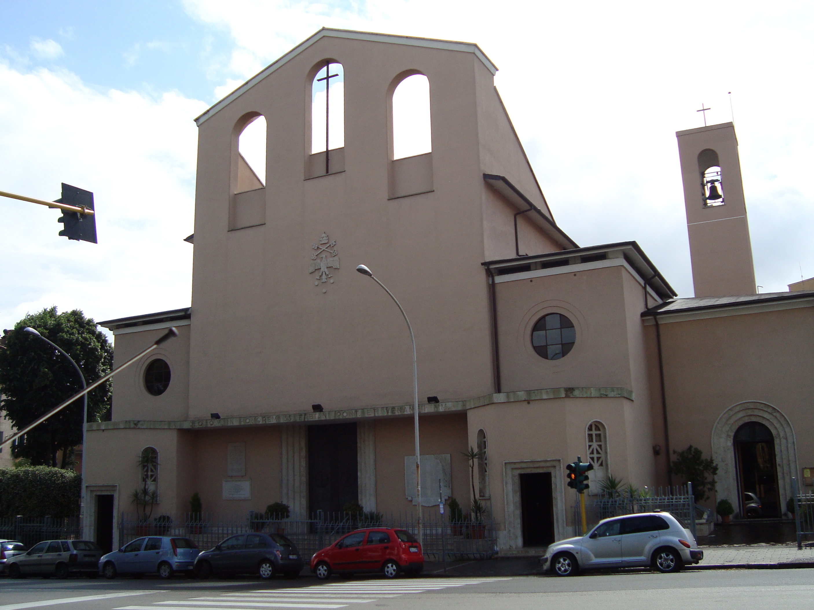 Église Santi Fabiano e Venanzio de Rome